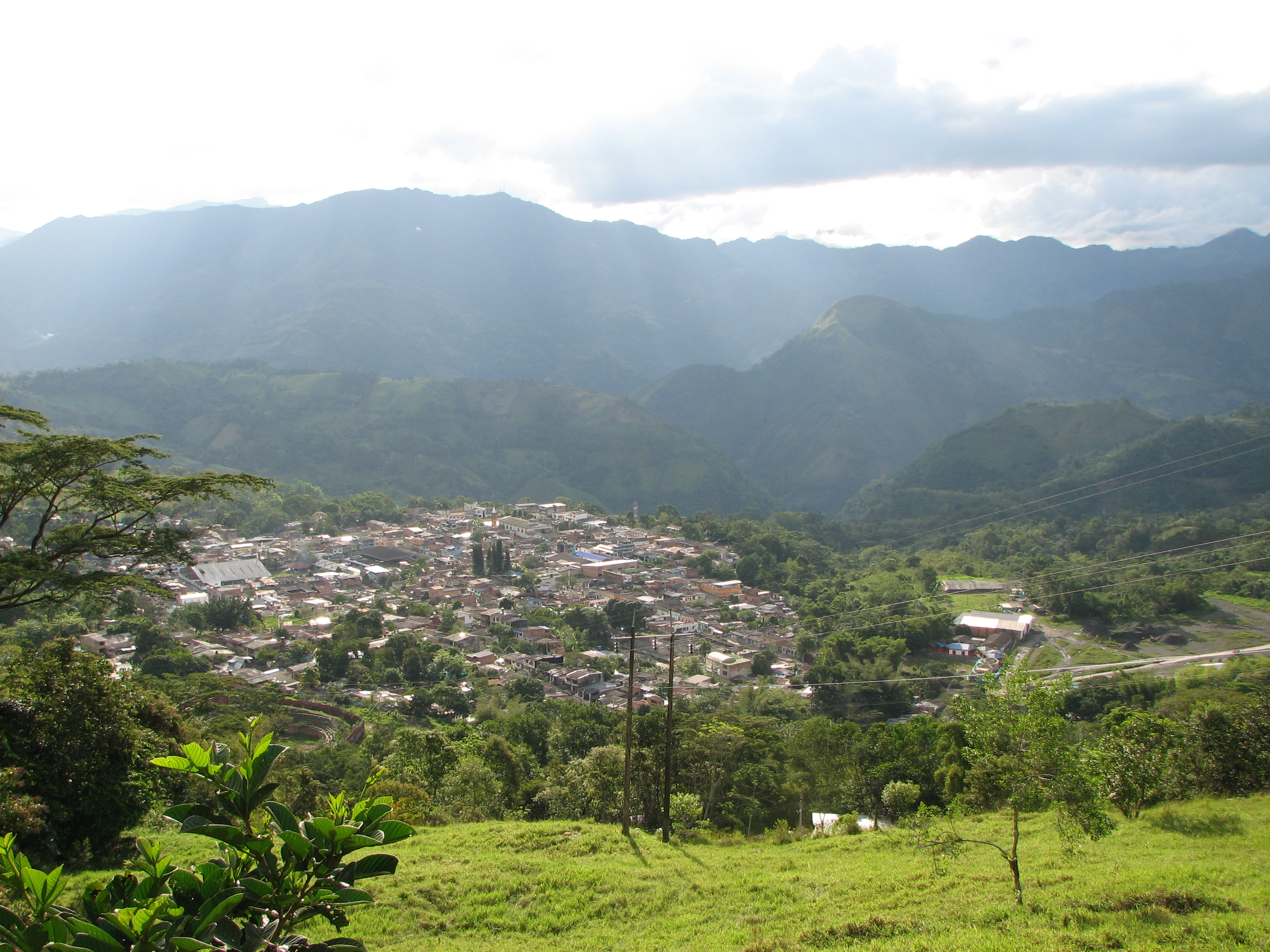 Panorámica de Muzo, Boyacá